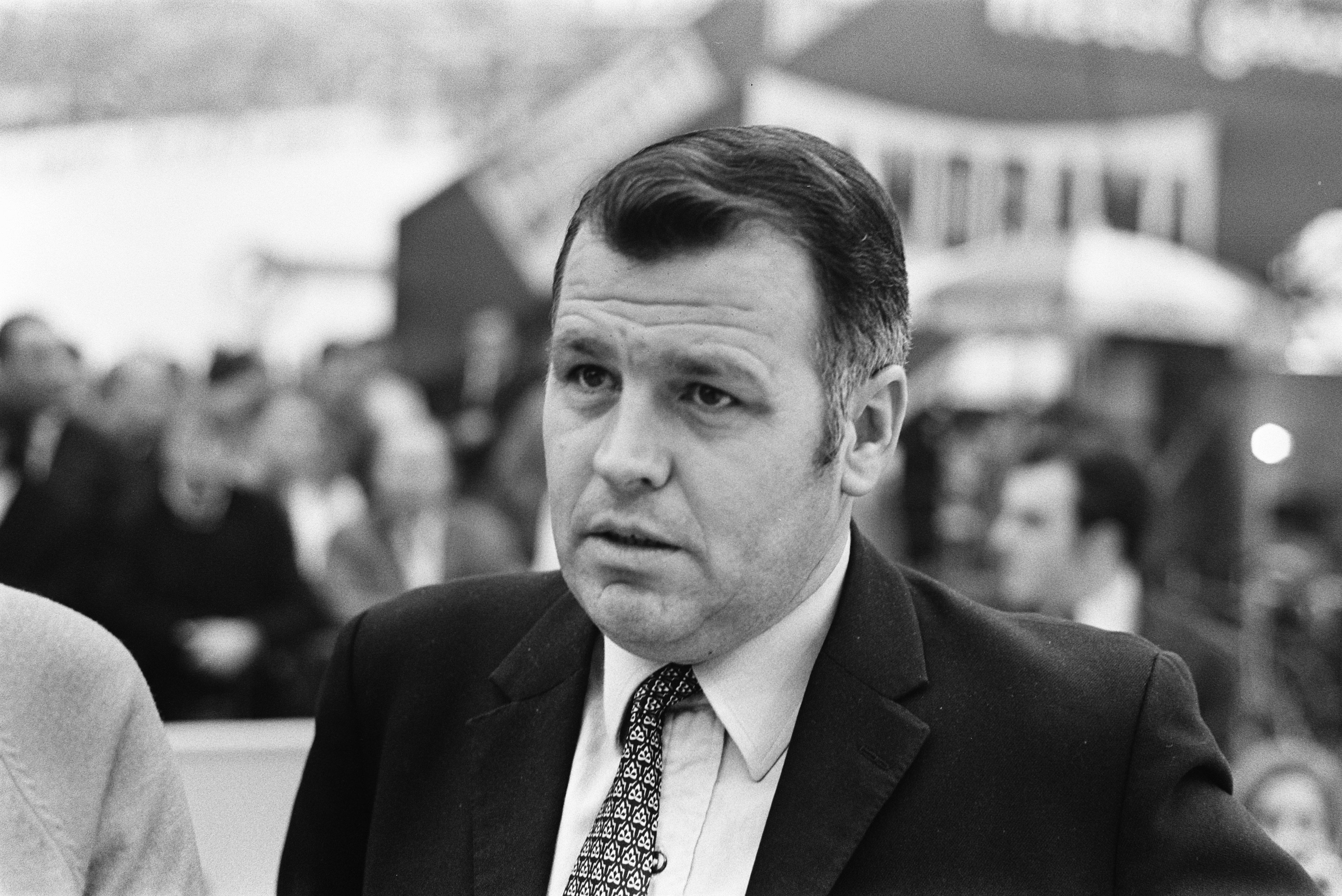 Collectie / Archief : Fotocollectie Anefo Reportage / Serie : [ onbekend ] Beschrijving : Vierde Amsterdamse Zesdaagse wielrennen in RAI. Nummers 11.12.13 Piet Liebregts , nummer 14 Rini Wagtmans Datum : 11 december 1969 Trefwoorden : WIELRENNEN Persoonsnaam : Liebregts, Piet, Wagtmans, Rini Fotograaf : Evers, Joost / Anefo Auteursrechthebbende : Nationaal Archief Materiaalsoort : Negatief (zwart/wit) Nummer archiefinventaris : bekijk toegang 2.24.01.05 Bestanddeelnummer : 923-0685